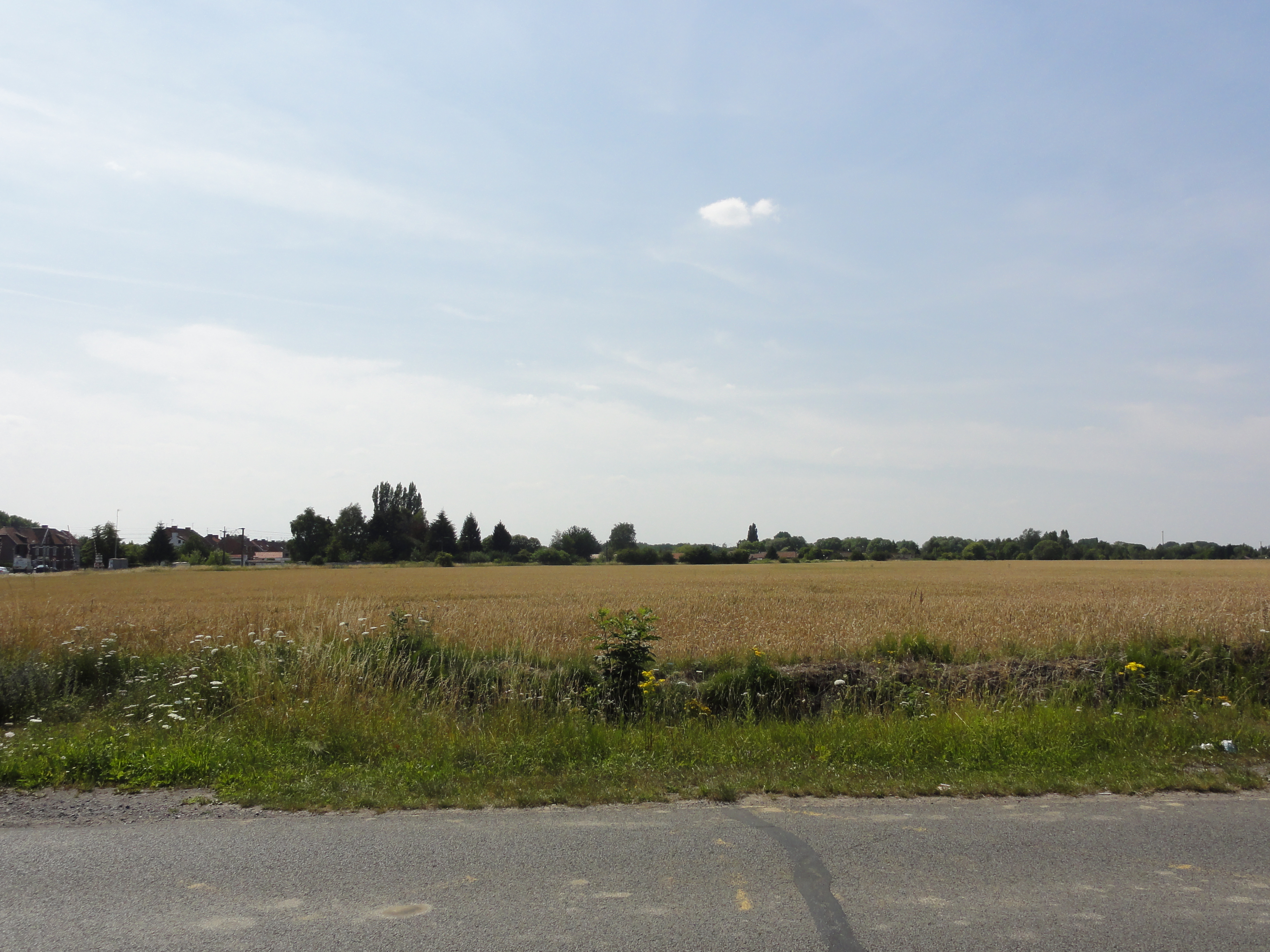 Terril n° 212A dit Cavalier du 10 de l'Escarpelle, disparu, vers la fosse n° 10 des mines de l'Escarpelle, Roost-Warendin, Nord, Nord-Pas-de-Calais, France.